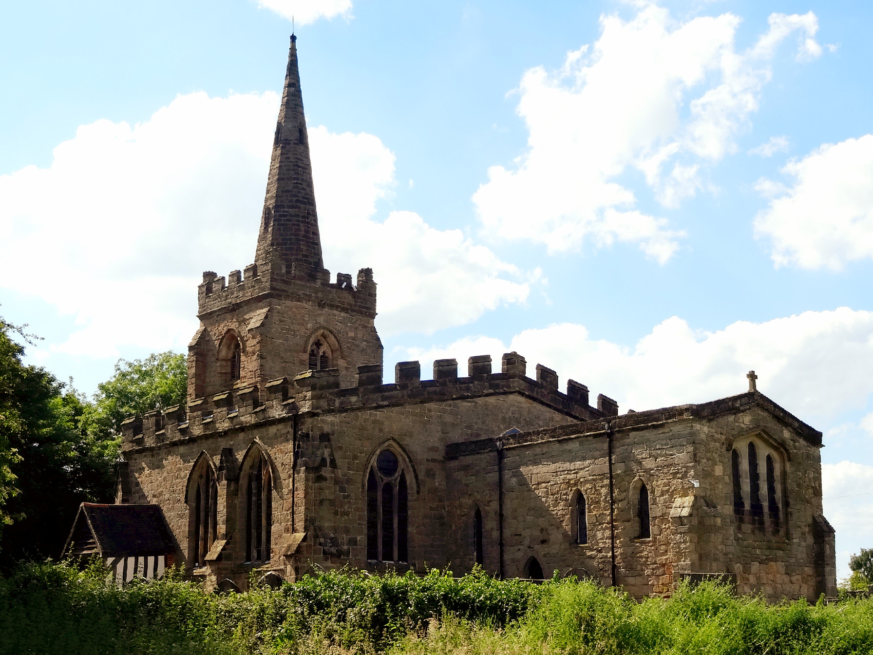 St Mary the Virgin's church, Weston on Trent